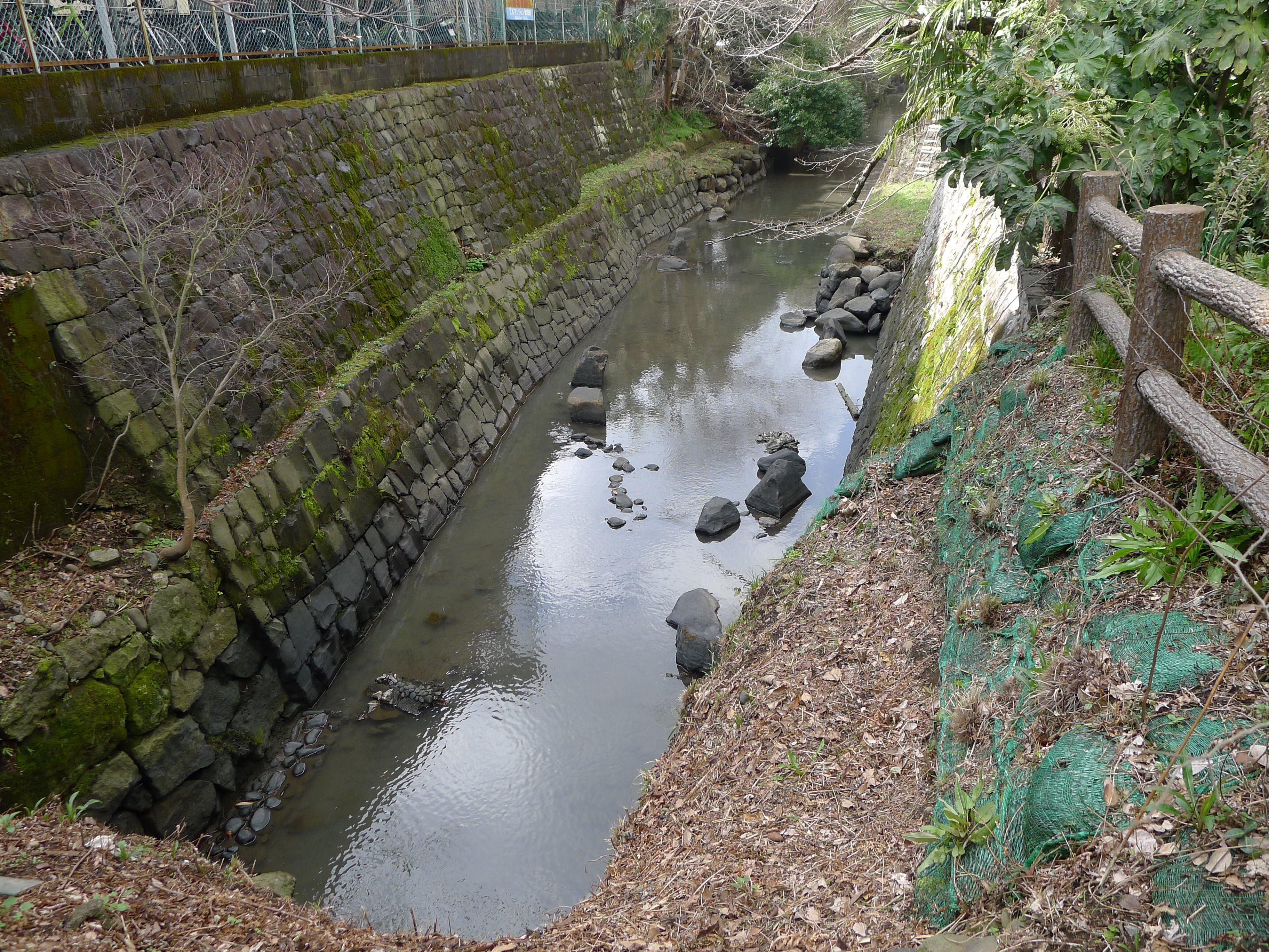 加藤清正が築いた熊本市内を流れる白川用水群の一つ渡鹿用水大井手（かんがい施設遺産登録）